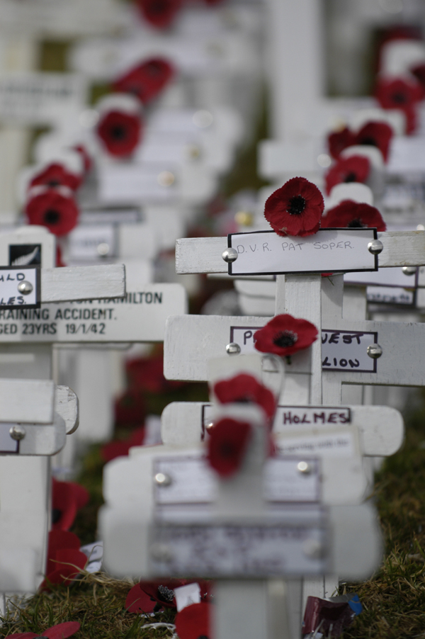 紀念陣亡將士的虞美人花和十字架。